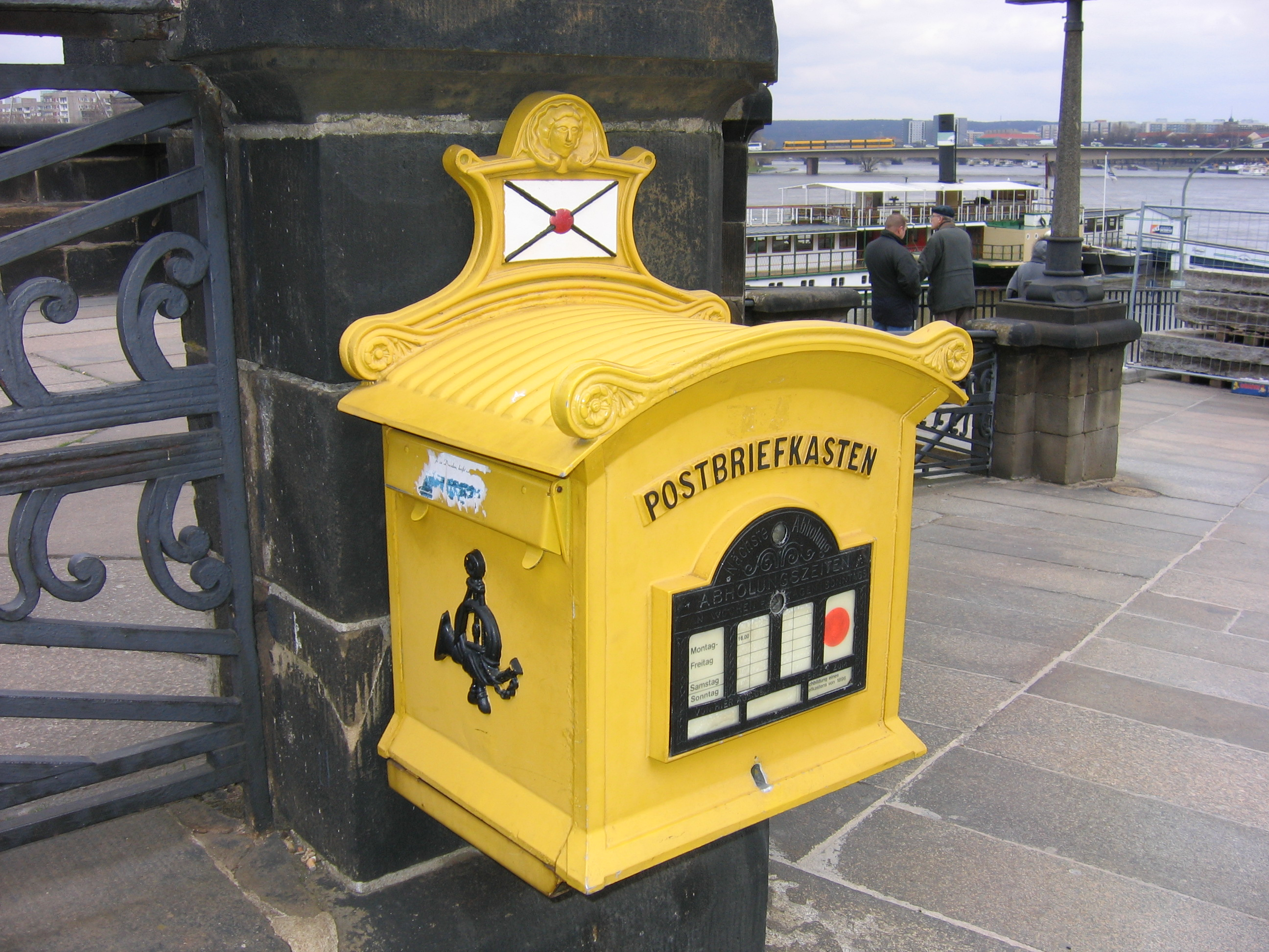 Postbriefkasten in Dresden mit Elbe im Hintergrund